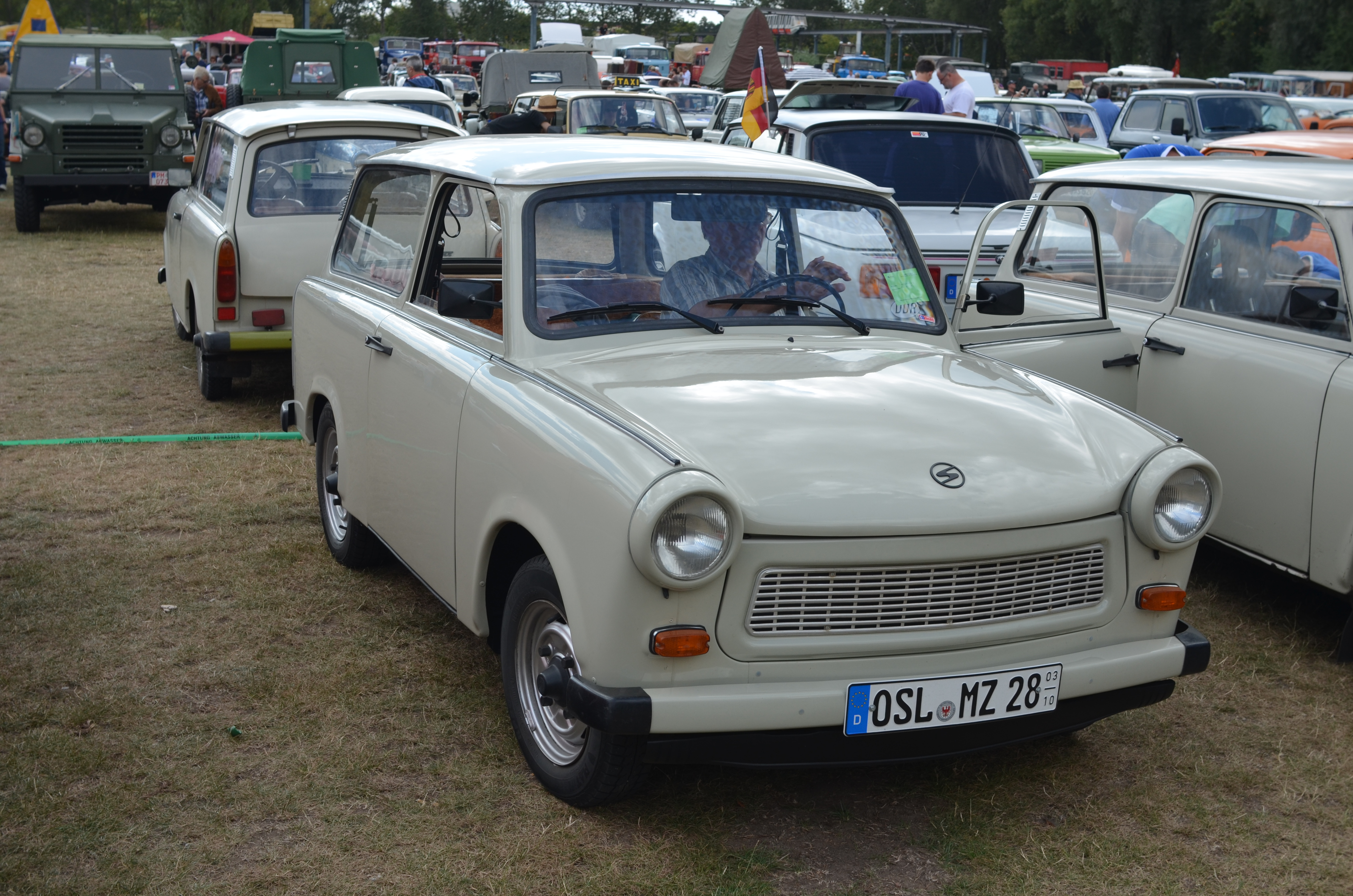 Trabant